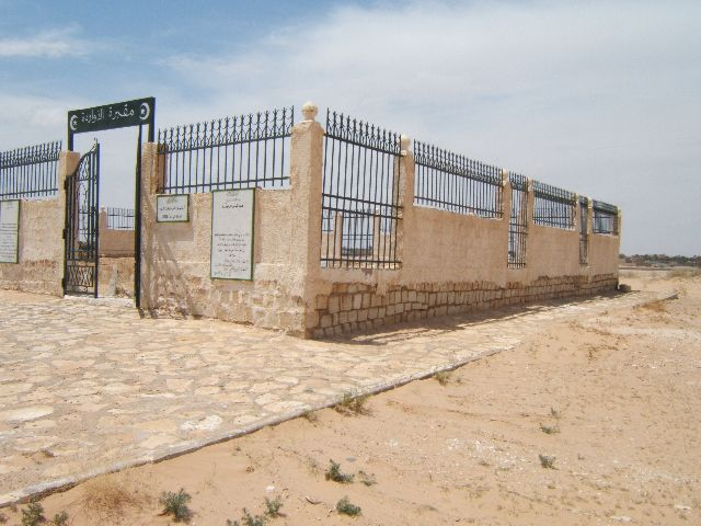 Cimetière de Sidi Khaled où est enterrée Hizia à Sidi Khaled